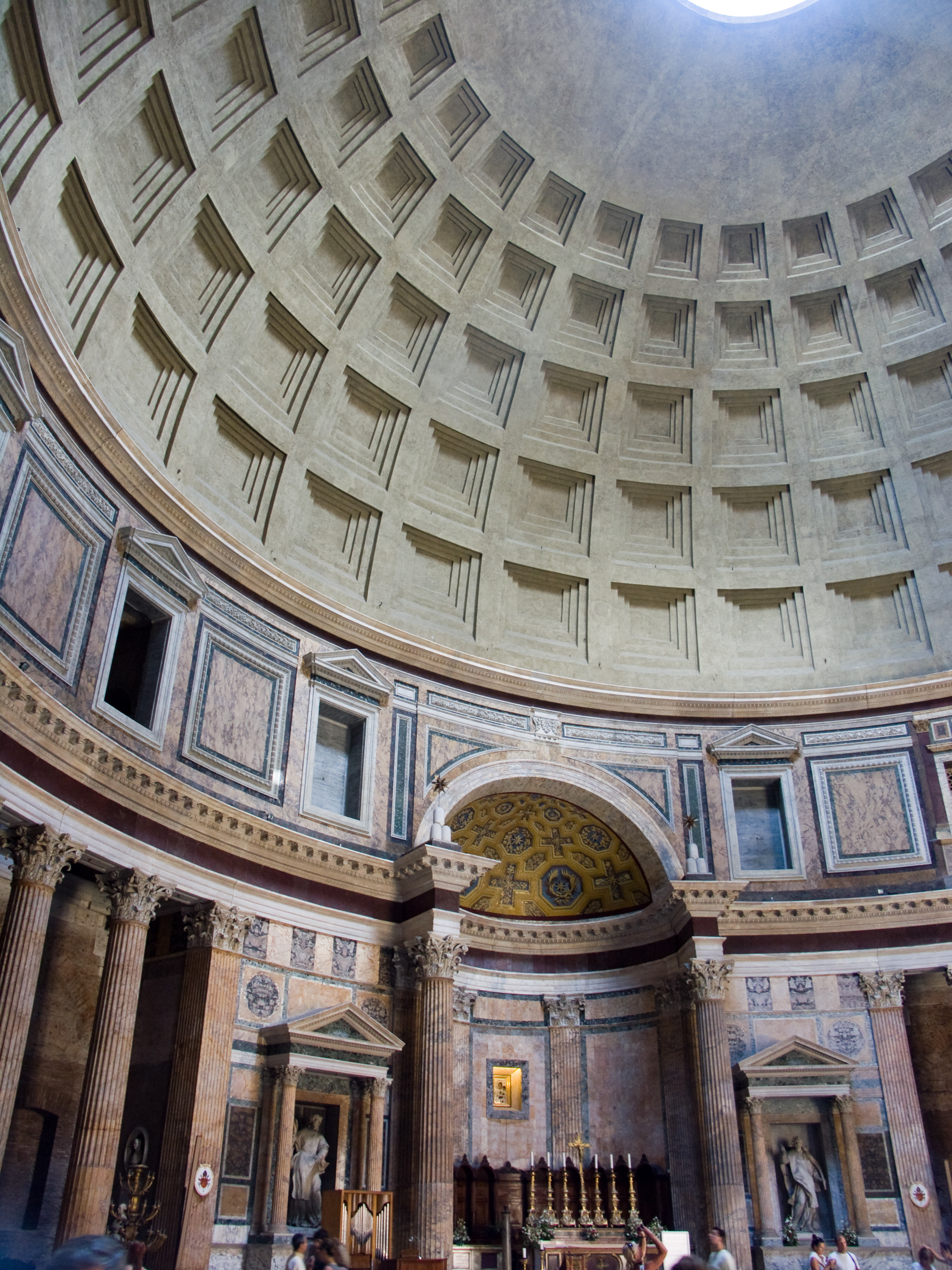 Intérieur du panteon à Rome